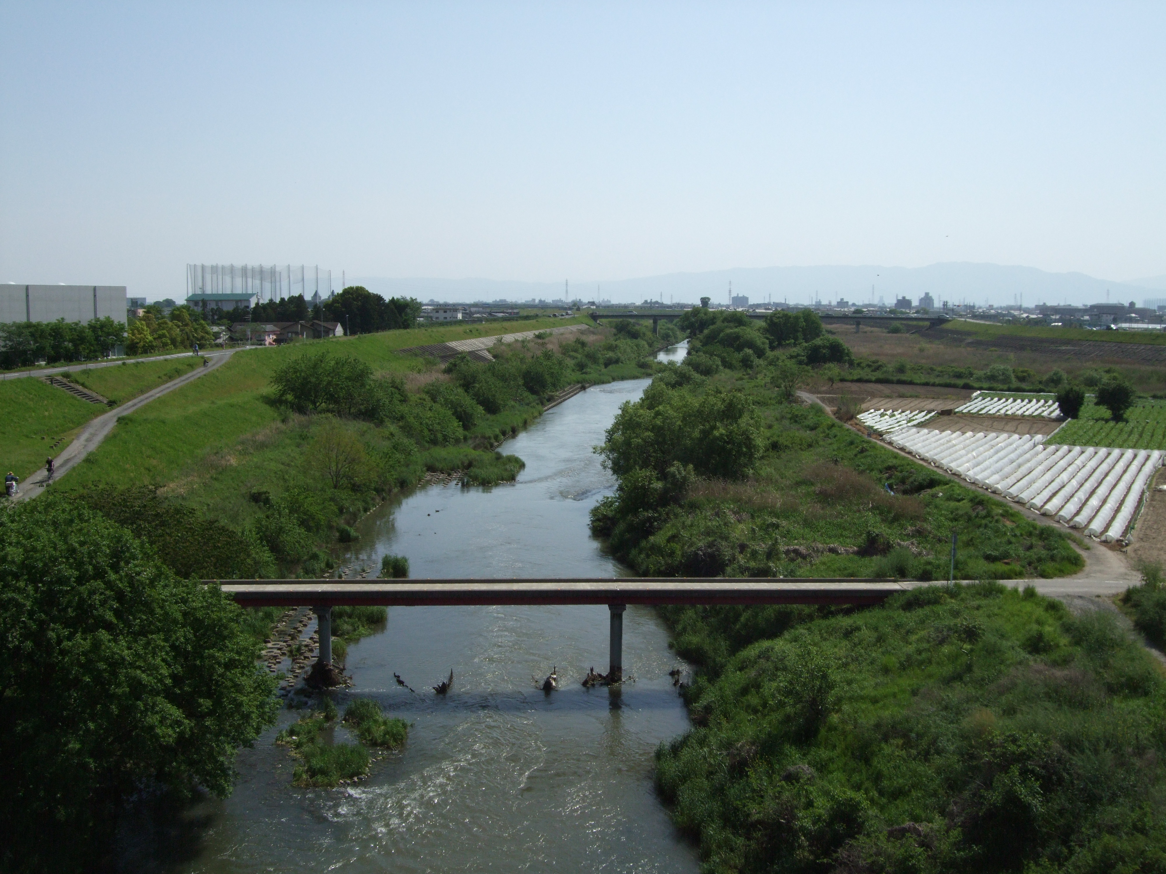 Ijira river in Gifu, Japan